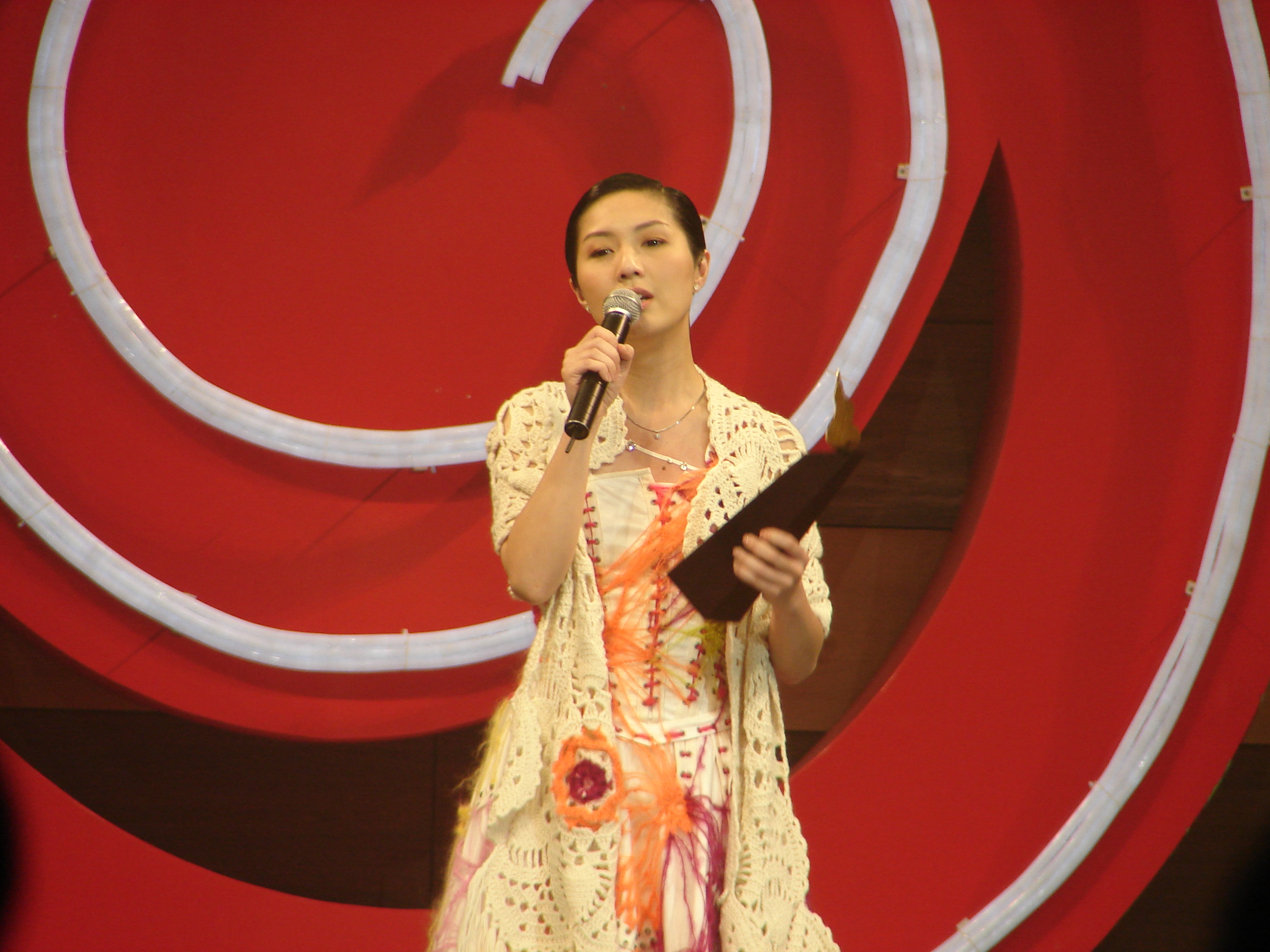 Miriam Yeung 楊千嬅@叱o宅903 - 2006 (01 January 2007)